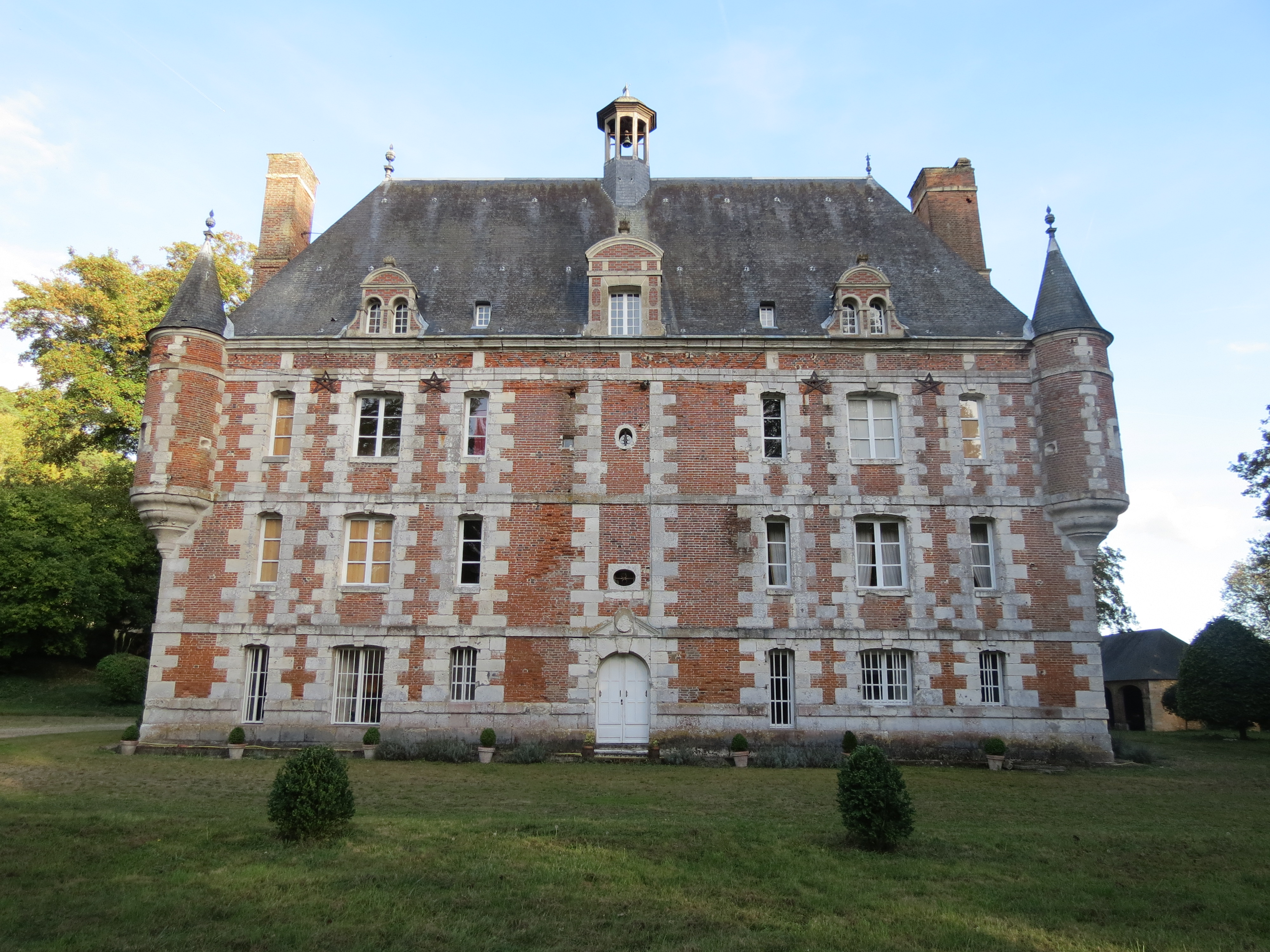 Château de Canteloup.